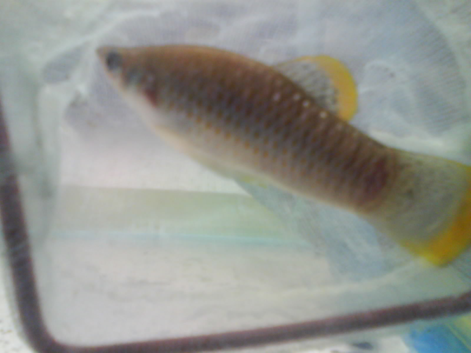 Foto de una Poecilia Mexicana